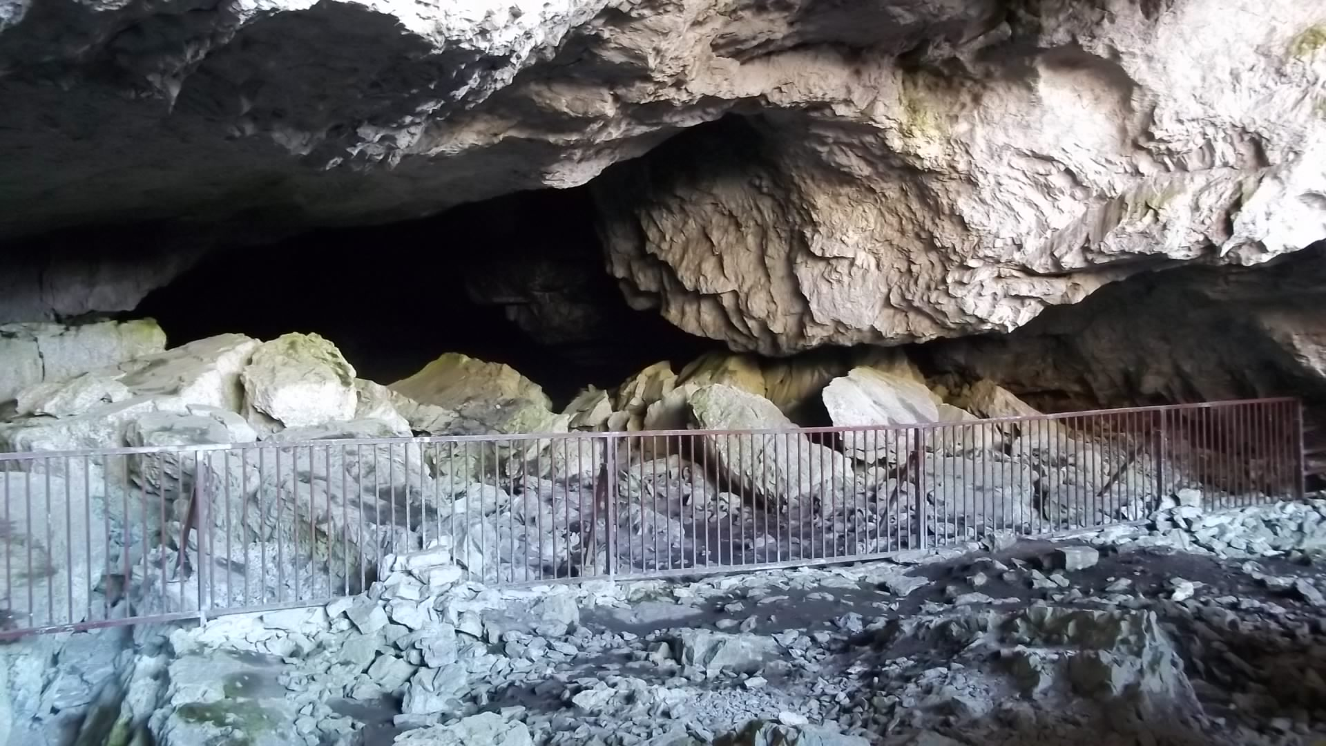 Gruta Casteret al Parc Nacional d'Ordesa i Mont Perdut This is a photography of a Site of Community Importance in Spain with the ID: ES0000016. Natura2000 entry, EEA entry